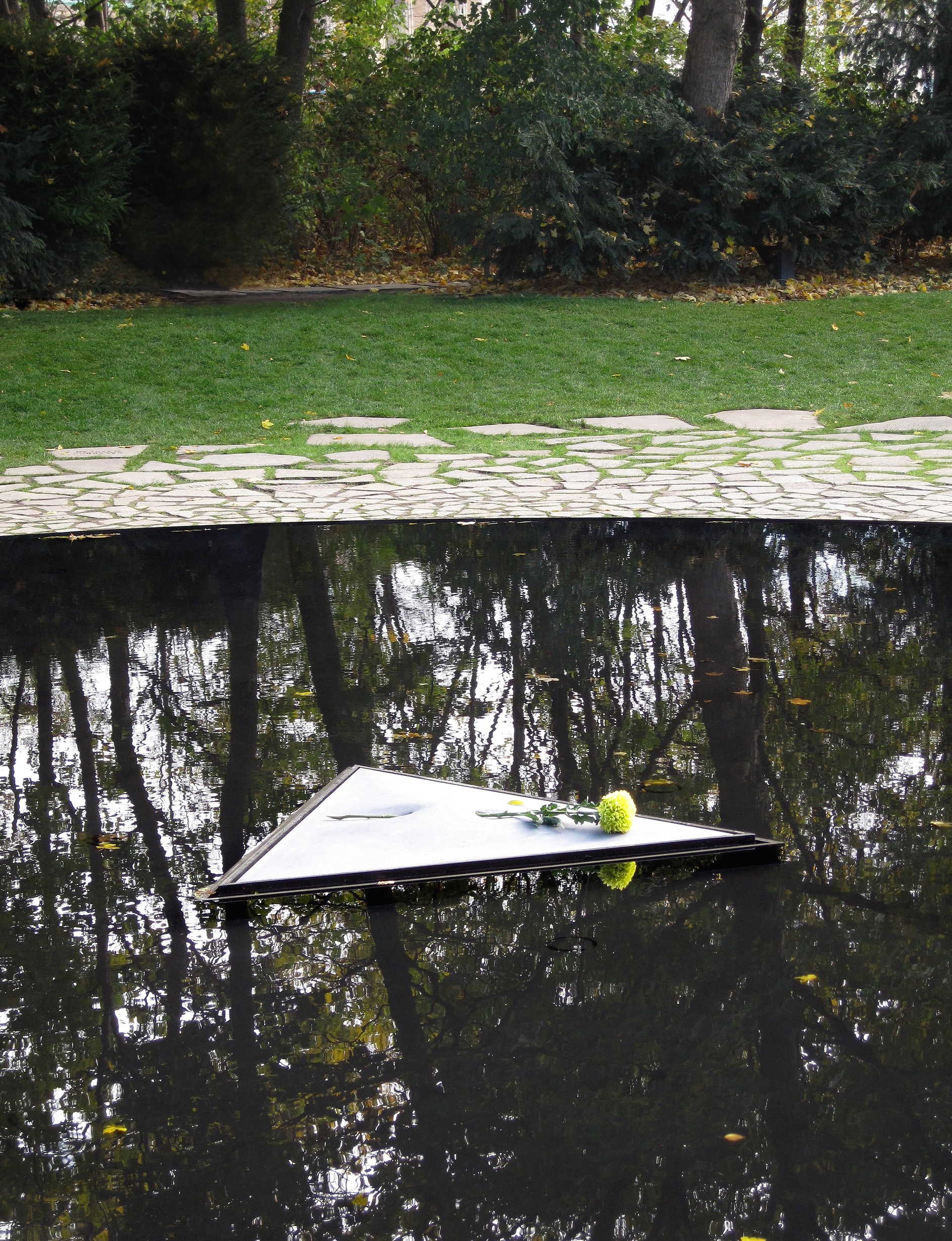 Gedenkstätte Denkmal für die im Nationalsozialismus ermordeten Sinti und Roma Europas in Berlin-Tiergarten südlich des Reichstagsgebäudes.